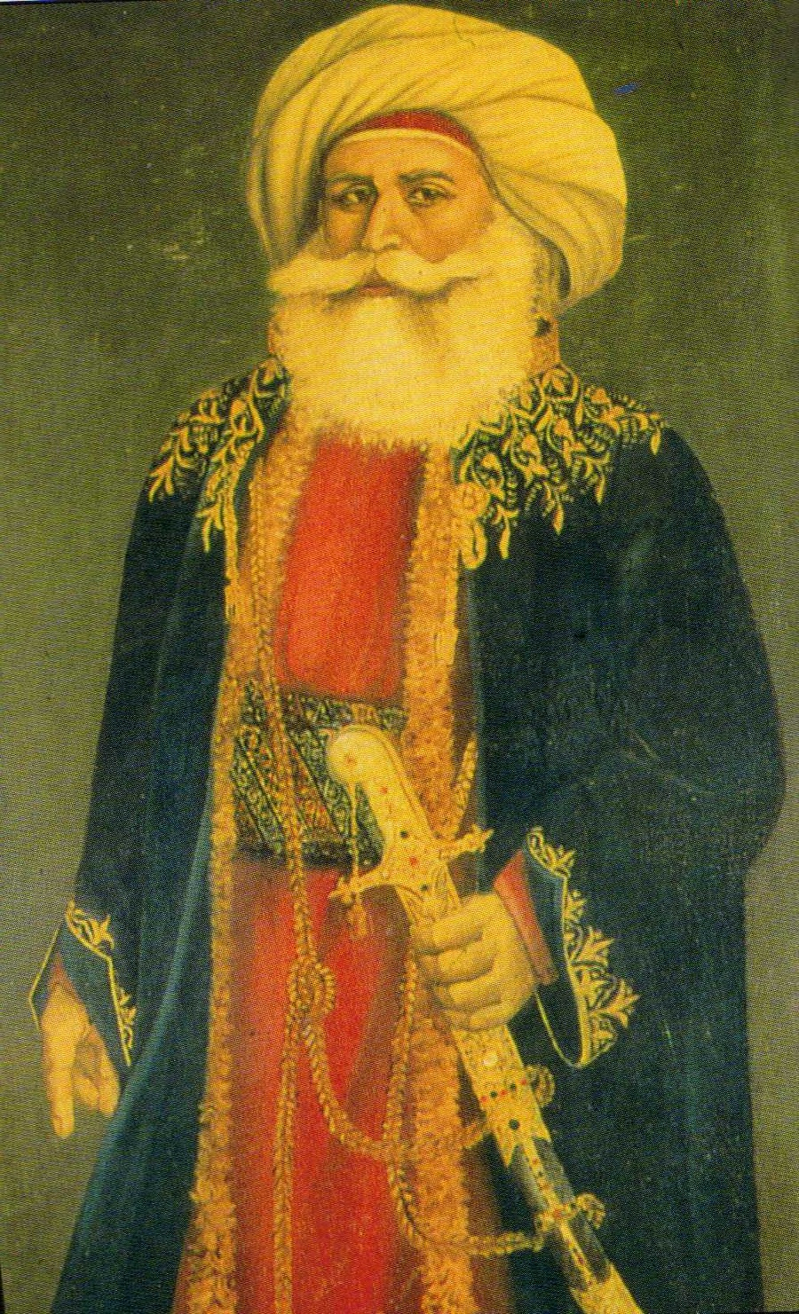 Portrait contemporain de Mourad bey. Huile sur toile.